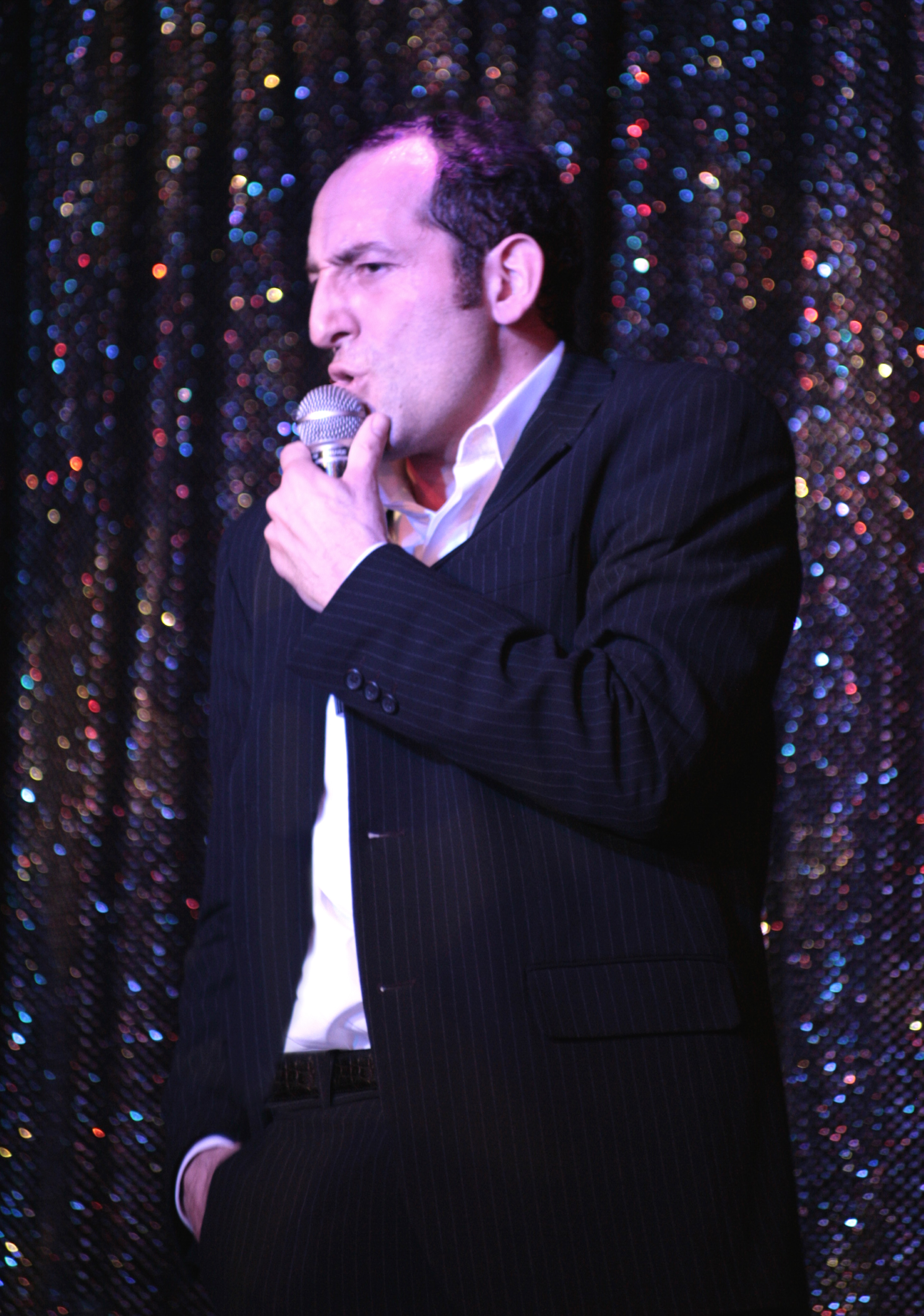 Pierre-Yves Noël Don Camilo 2005